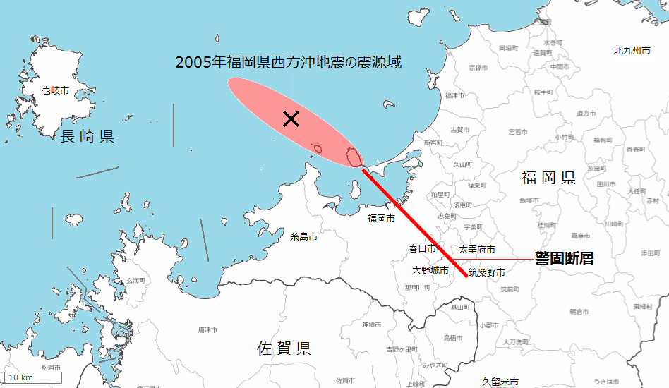 警固断層帯の位置図。赤色の細い線が警固断層（警固断層帯南東部）。ピンク色の楕円の領域が福岡県北西沖の断層（仮称・警固断層帯北西部、2005年福岡県西方沖地震の震源域）。 白地図: 国土地理院 地理院タイル白地図(基本測量成果ではない) 断層位置: 「警固（けご）断層帯の長期評価について 図2」、地震調査委員会、2007年